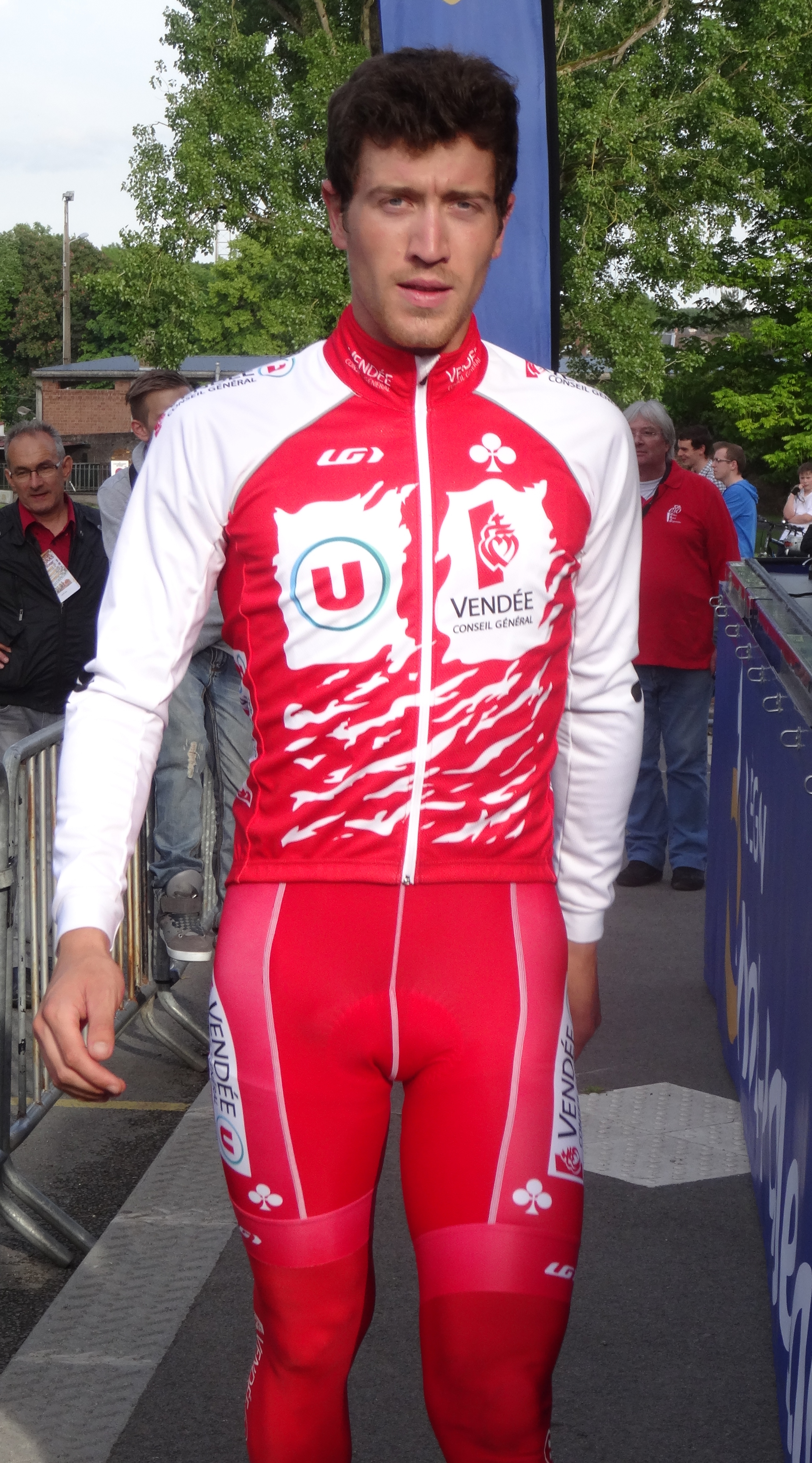 Reportage photographique réalisé le vendredi 23 mai 2014 à l'occasion de l'arrivée de la première étape du Paris-Arras Tour 2014 devant la citadelle d'Arras, Pas-de-Calais, Nord-Pas-de-Calais, France. Depicted person: Julien Morice